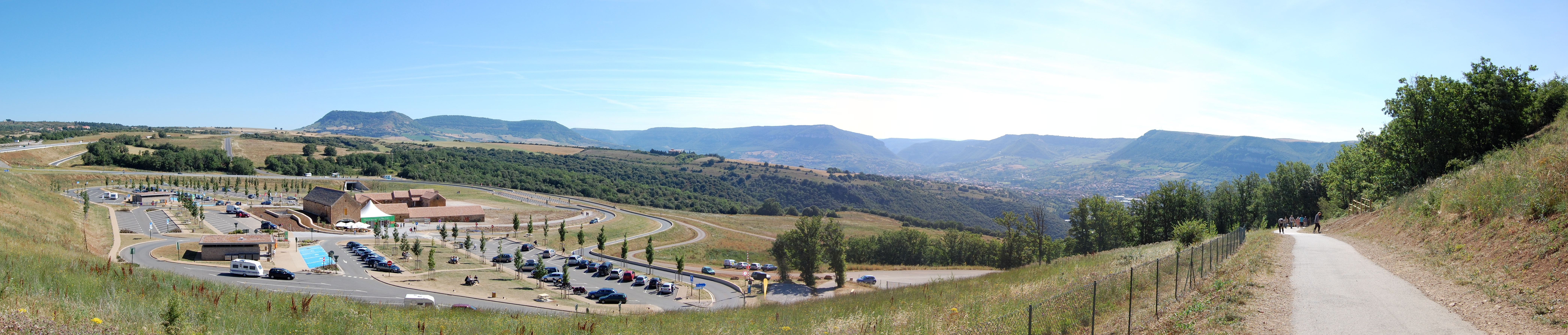 Vue panoramique de l'aire de repos du Viaduc de Millau (Autoroute française A75). Le chemin en pente à (droite) permet d'aller observer le viaduc. Travail personnel, sous licence CC-BY-SA-3.0. Appareil photo utilisé : Nikon D40